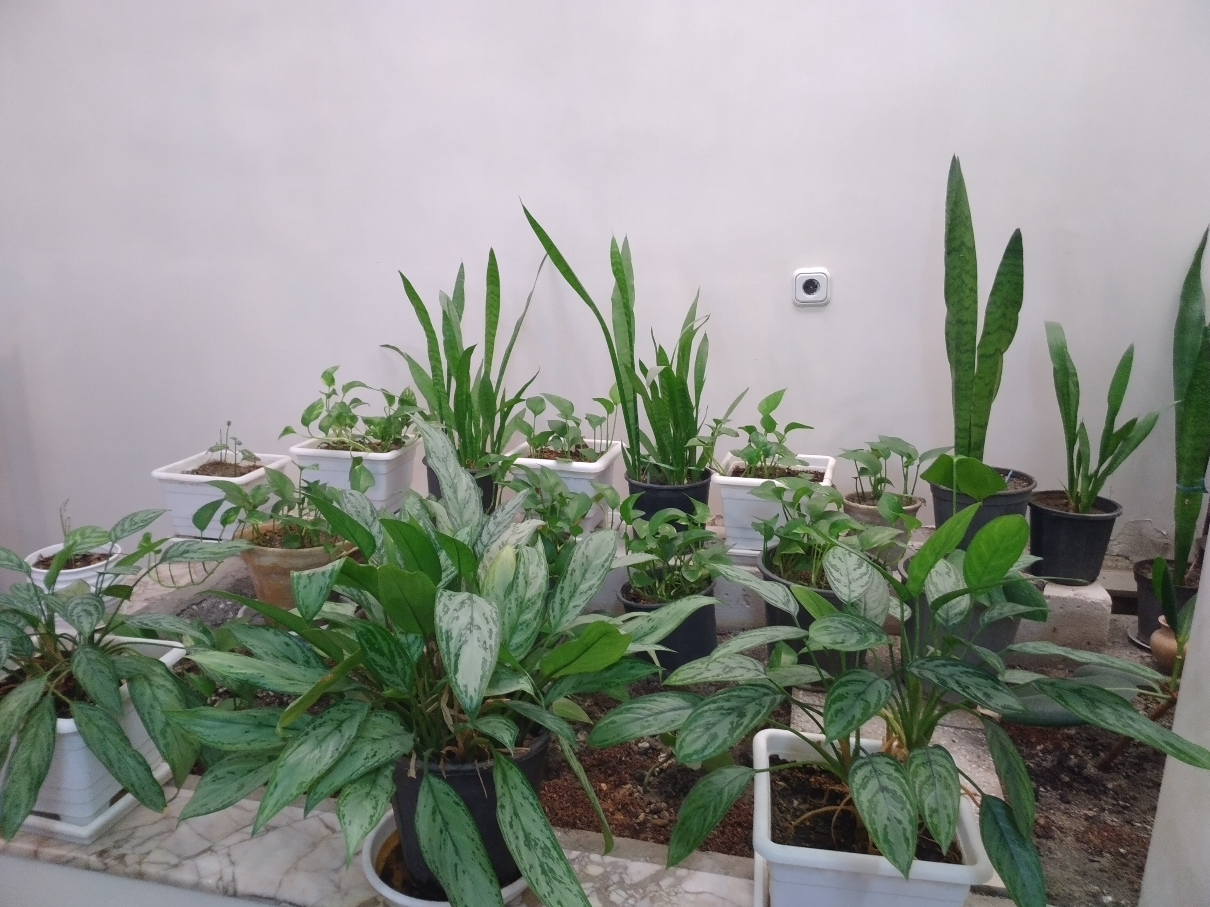 گل‌ها در پاسیو